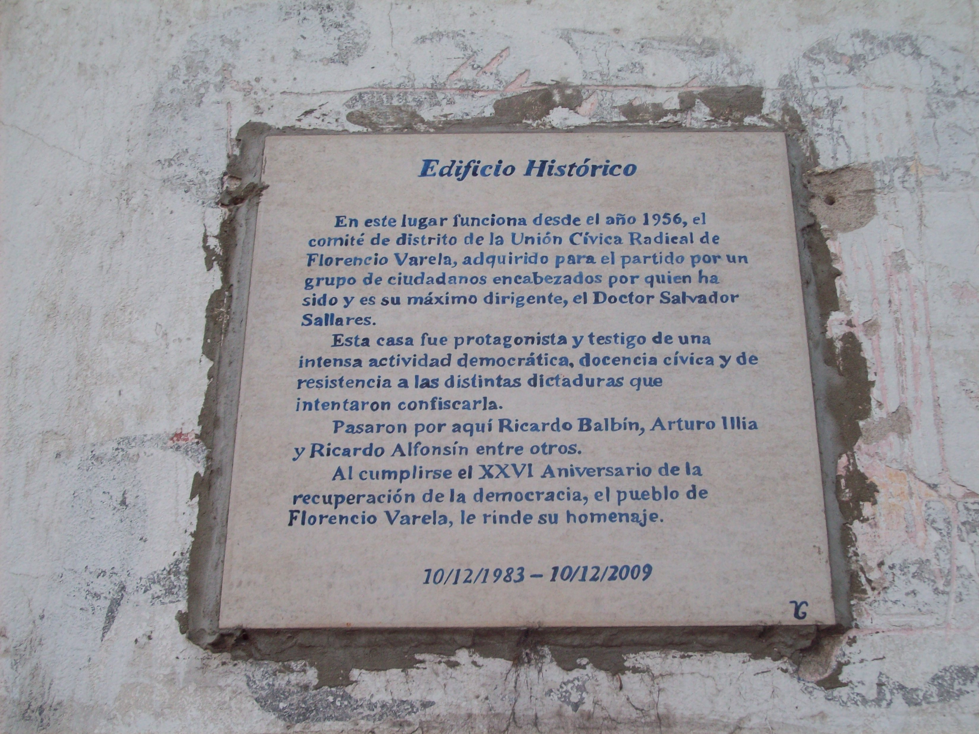 Foto de la placa de ceramica en la casa de la UCR de Florencio Varela.